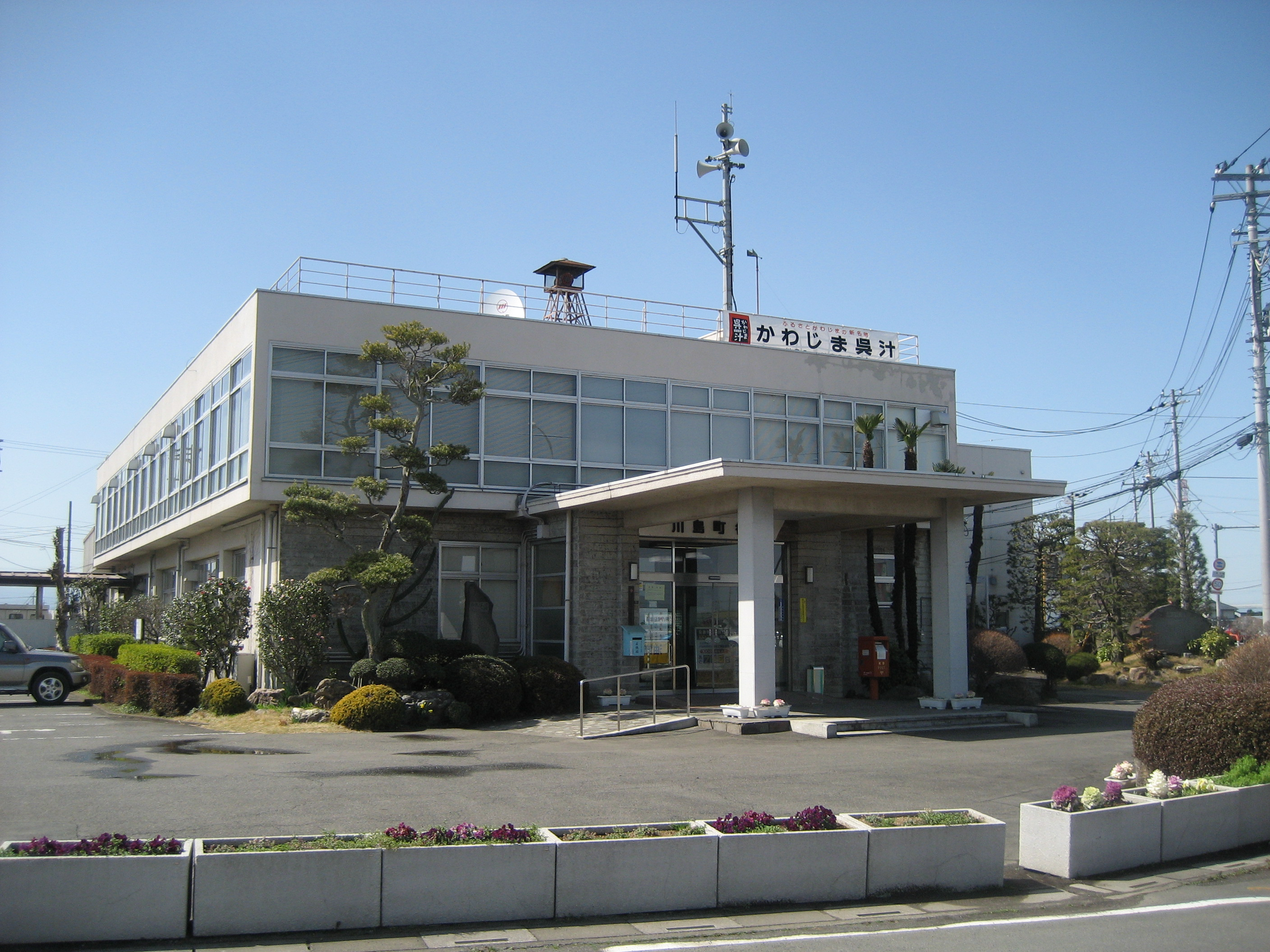 埼玉県川島町役場